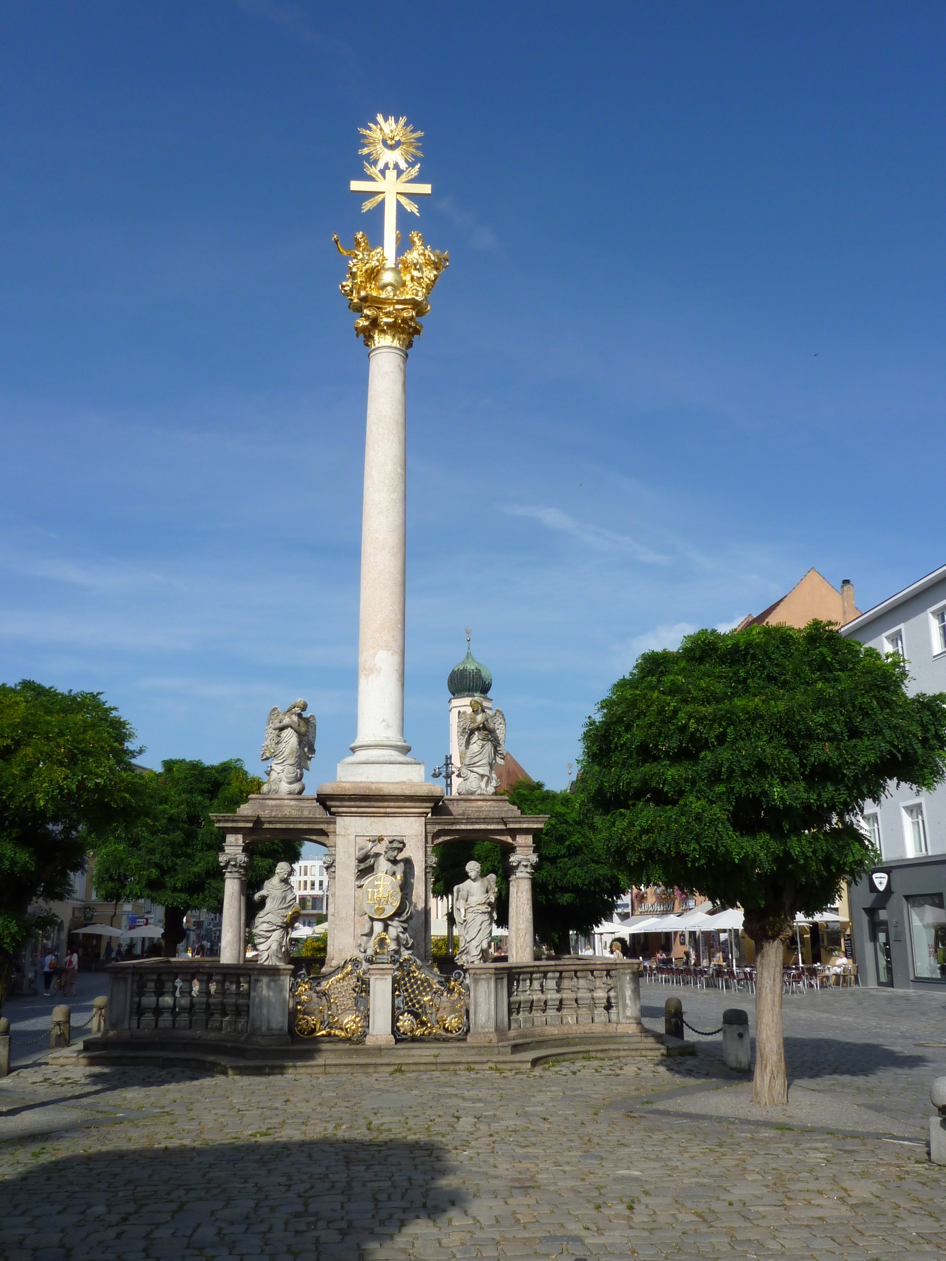 Barocke Säule am Straubinger Theresienplatz, freistehend mit umgebender Balustrade aus dem Jahr 1704-09.This is a photograph of an architectural monument.